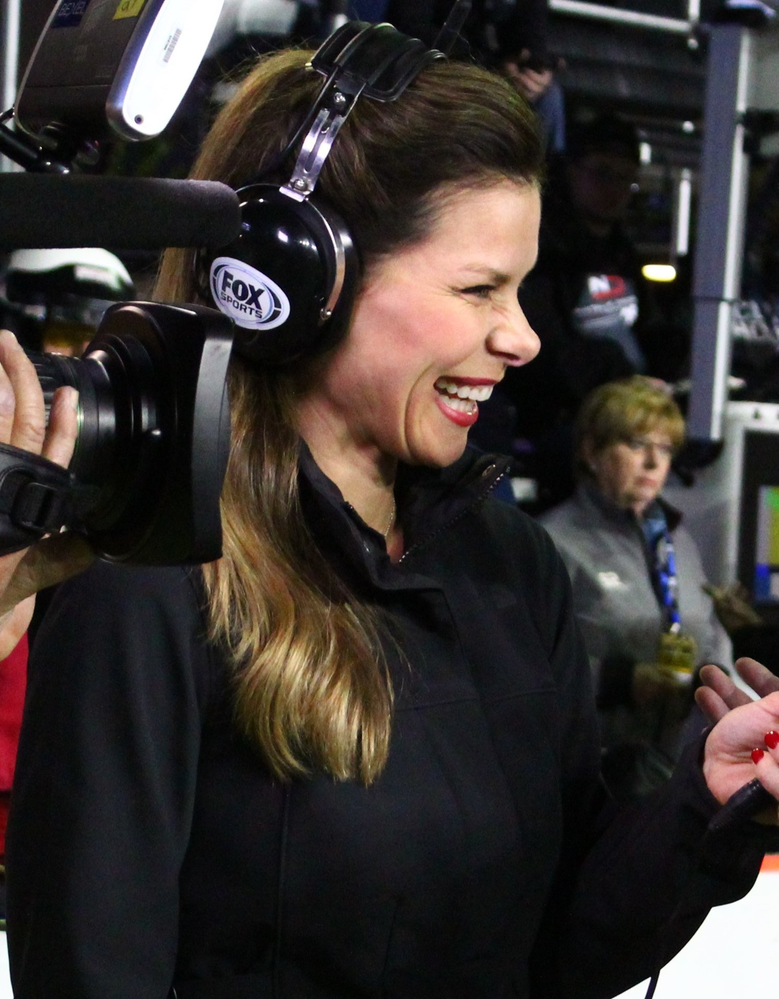 2019 Daytona 500